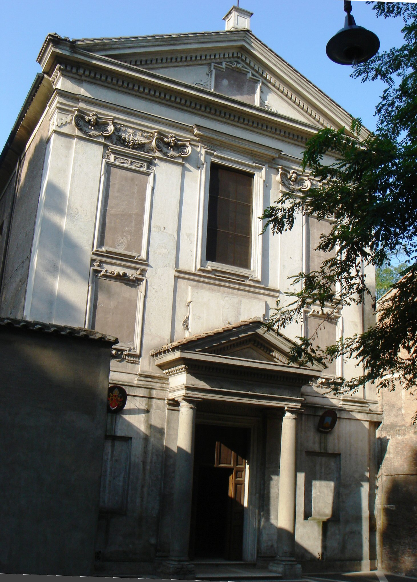 Roma, San Cesareo in Palatio a via di Porta San Sebastiano